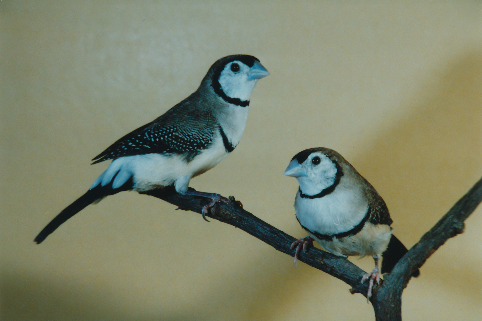 Ringelastrild Paar